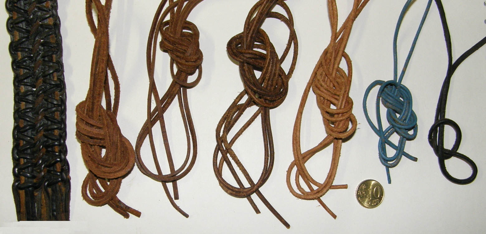 Lederschnuersenkel, eckig, rund, farbig